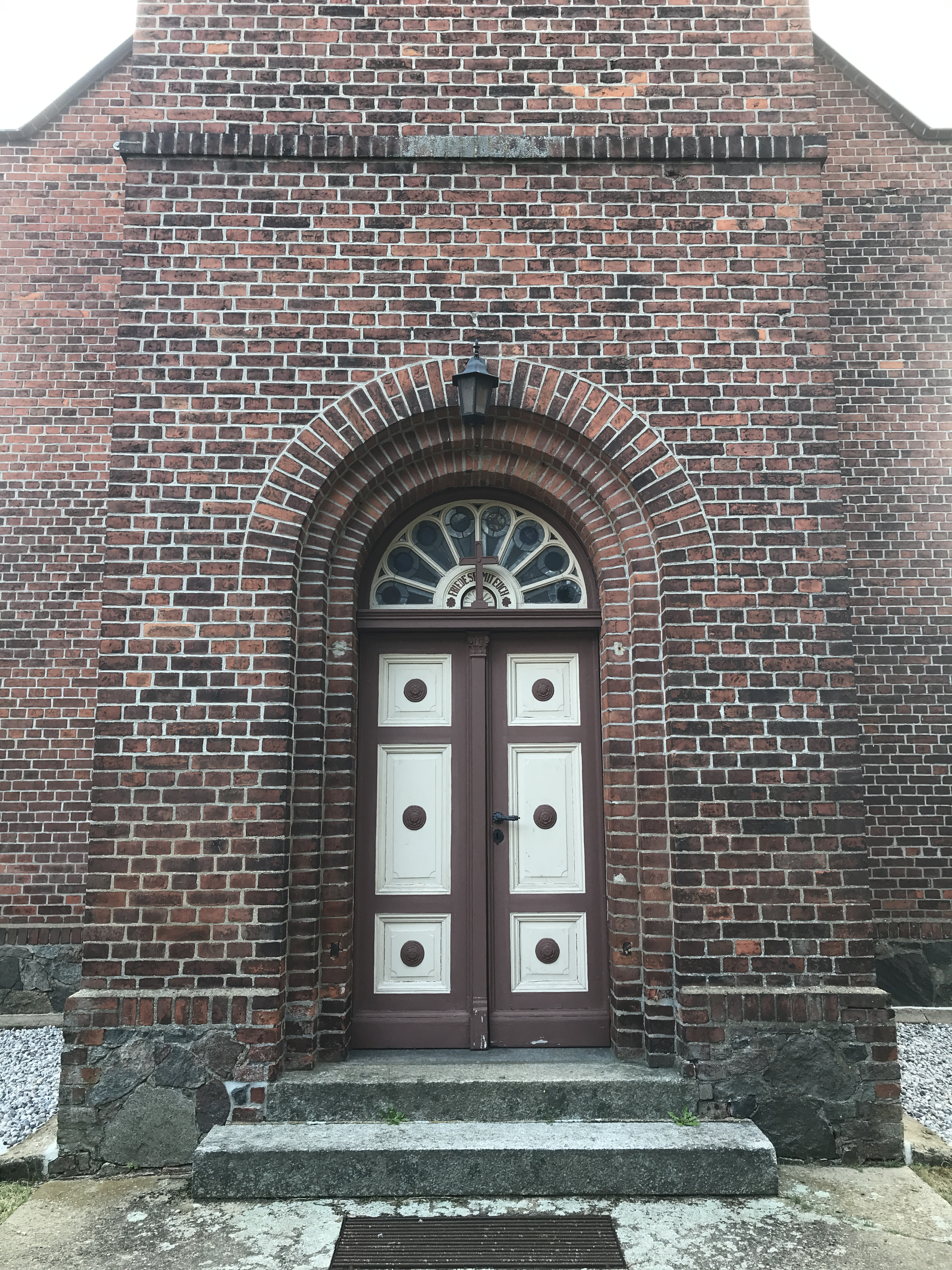 Die Dorfkirche Mochow in der Gemeinde Schwielochsee im Landkreis Dahme-Spreewald ist eine Saalkirche aus den Jahren 1879/1880. Im Innern steht eine bauzeitliche Kirchenausstattung.